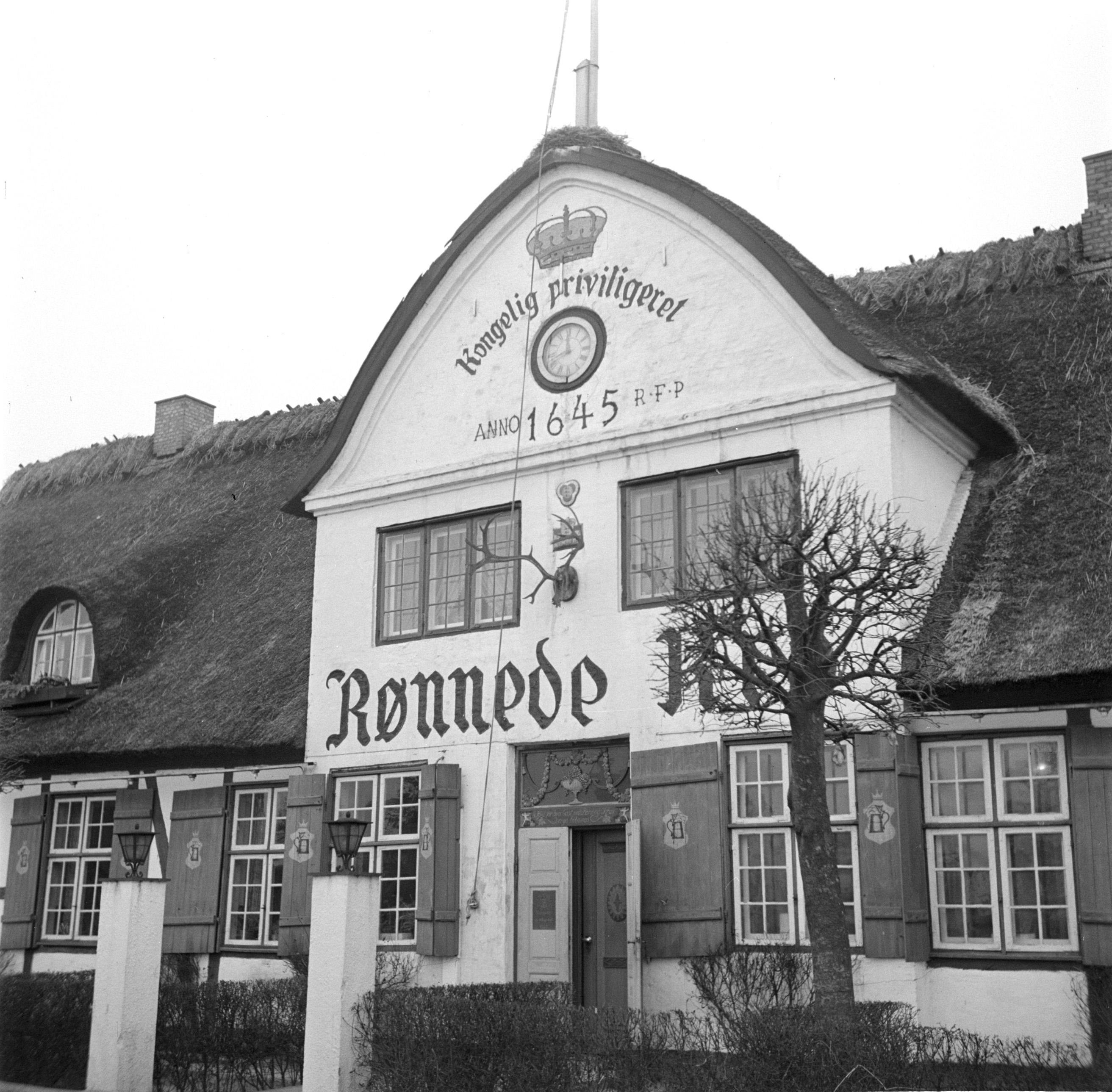 Collectie / Archief : Fotocollectie Van de Poll Reportage / Serie : Bezoek aan Kopenhagen Beschrijving : Herberg Rønnede Kro in Rønnede op Seeland, gebouwd in 1645 Datum : maart 1954 Locatie : Denemarken Trefwoorden : horeca Fotograaf : Poll, Willem van de, [onbekend] Auteursrechthebbende : Nationaal Archief Materiaalsoort : Negatief (zwart/wit) Nummer archiefinventaris : bekijk toegang 2.24.14.02 Bestanddeelnummer : 252-8860